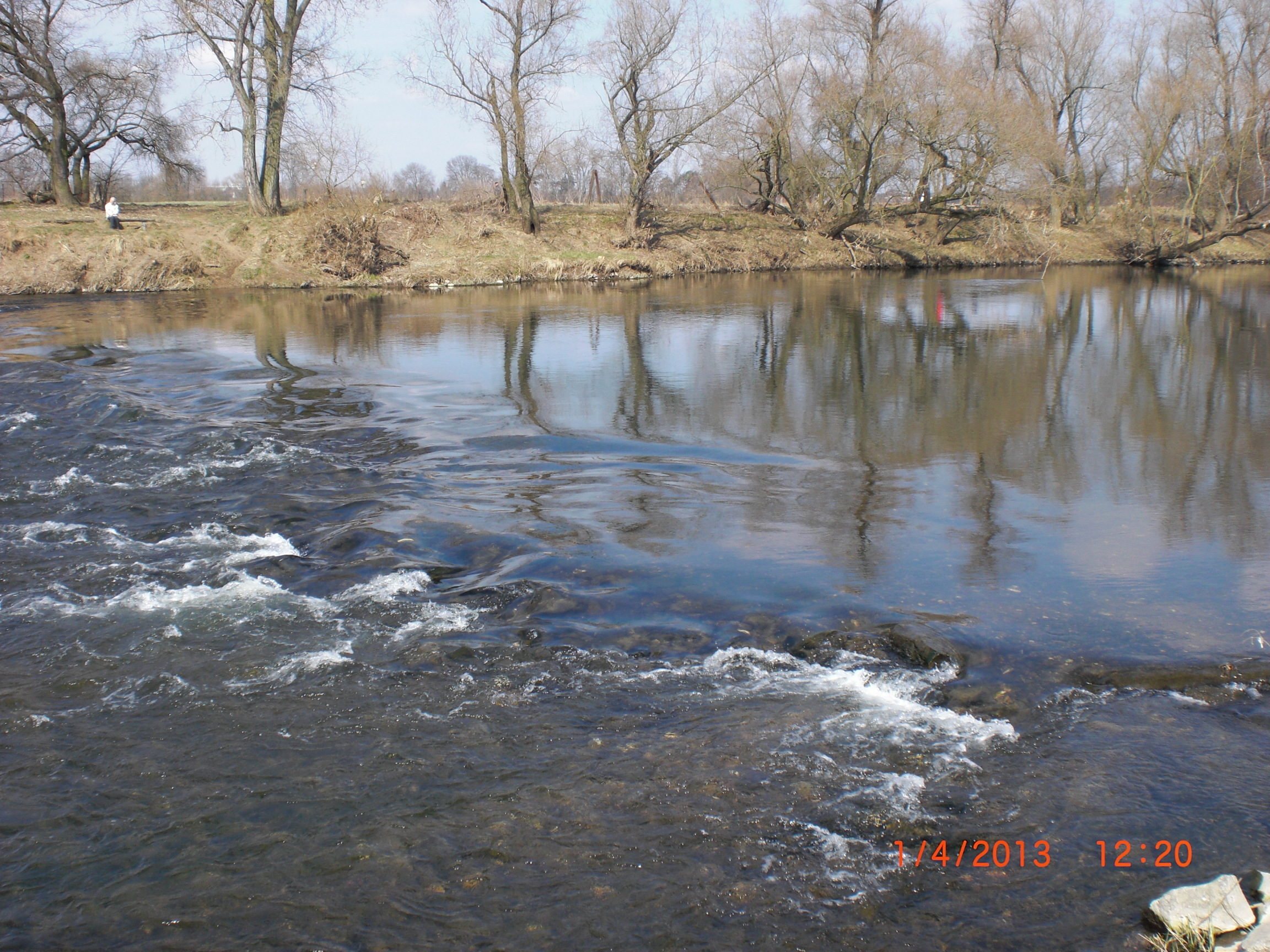 Die Furt von Meindorf im heutigen Zustand, an dieser Stelle setzte am 1. Juni 1796 die französische Division Collaud über die Sieg.